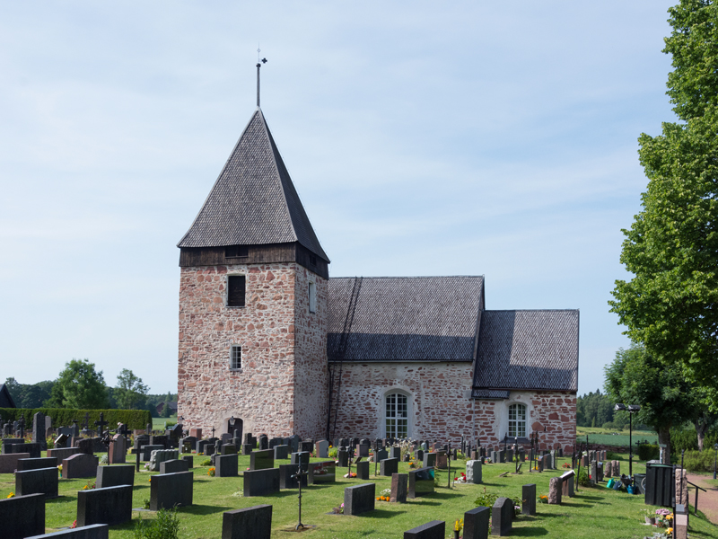 Hammarlands kyrkas södra fasad